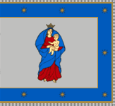 Flag of Kretinga and Kretingos rajono savivaldybė